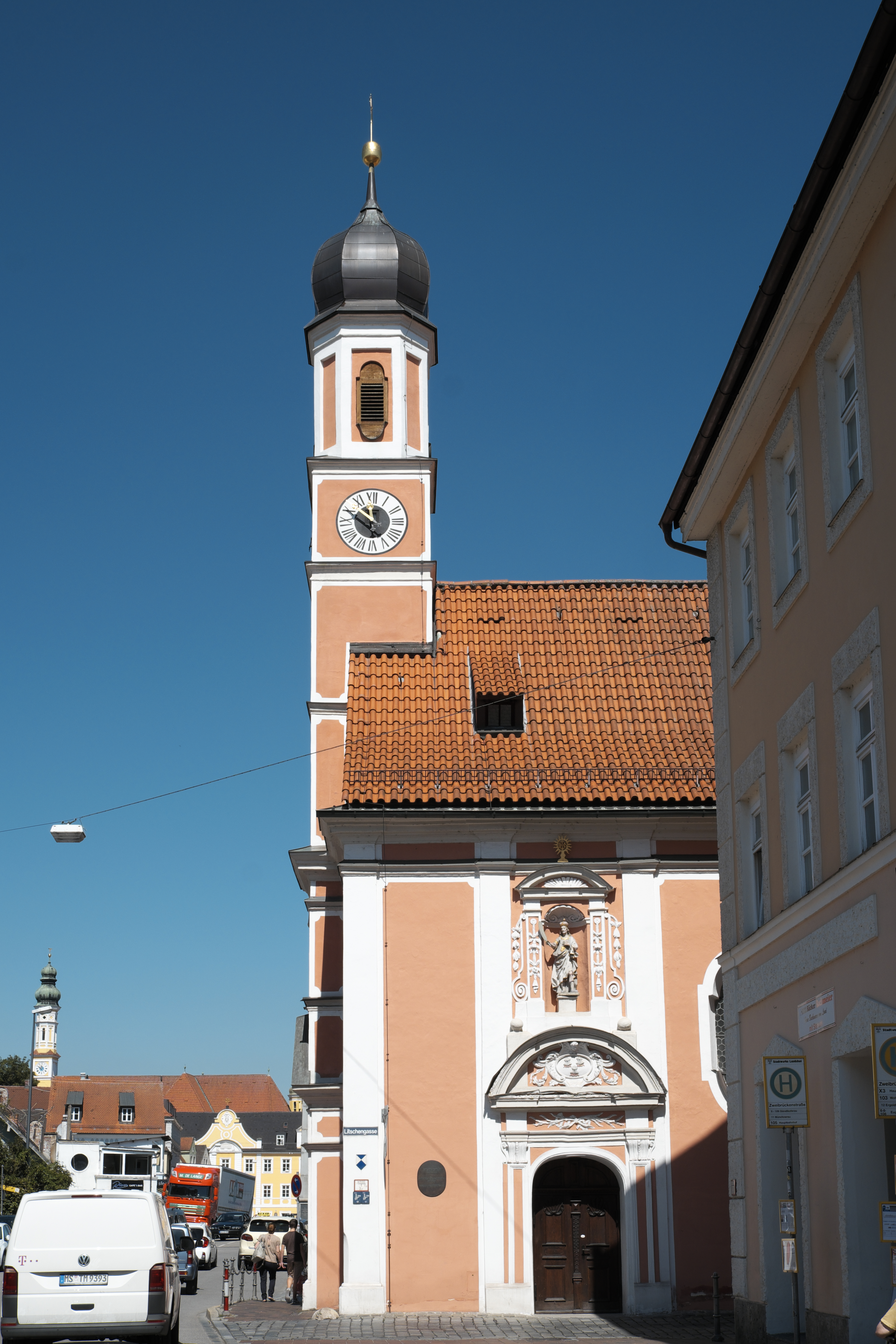 Katholische Kirche St. Sebastian in Landshut (Bayern/Deutschland), Ansicht von Süden